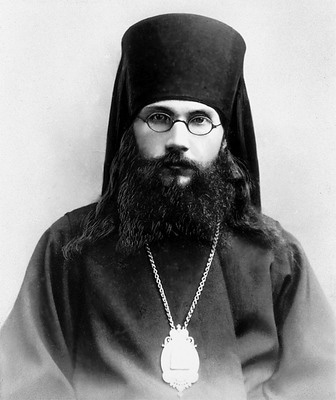 Феодор (Поздеевский), еп. Волоколамский.